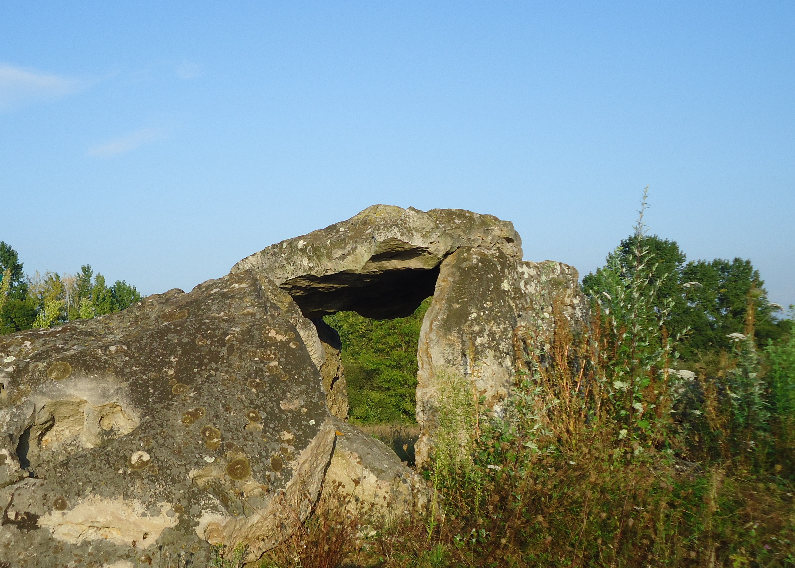 Dolmen d'Amenon sur la commune de Saint-Germain-d'Arcé. .